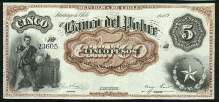 5 чилийских песо, региональный выпуск банка “Banco del Pobre”. Аверс. Первый губернатор Чили Педро де Вальдивия рассматривает глобус.